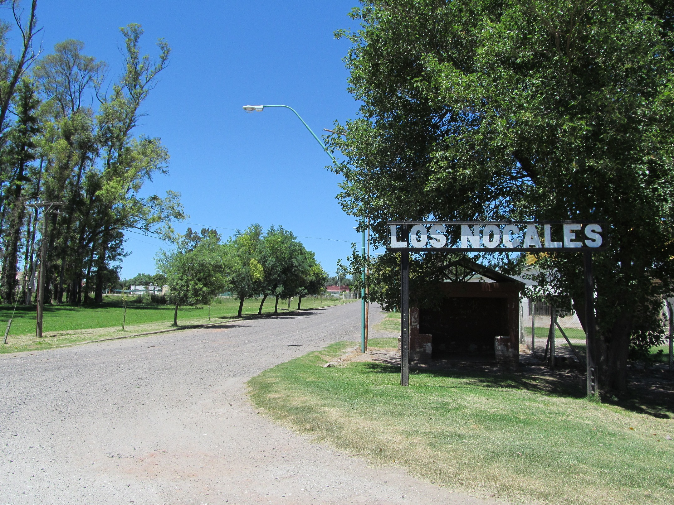 Acceso principal a la localidad de Los Nogales, Santa Fe, Argentina